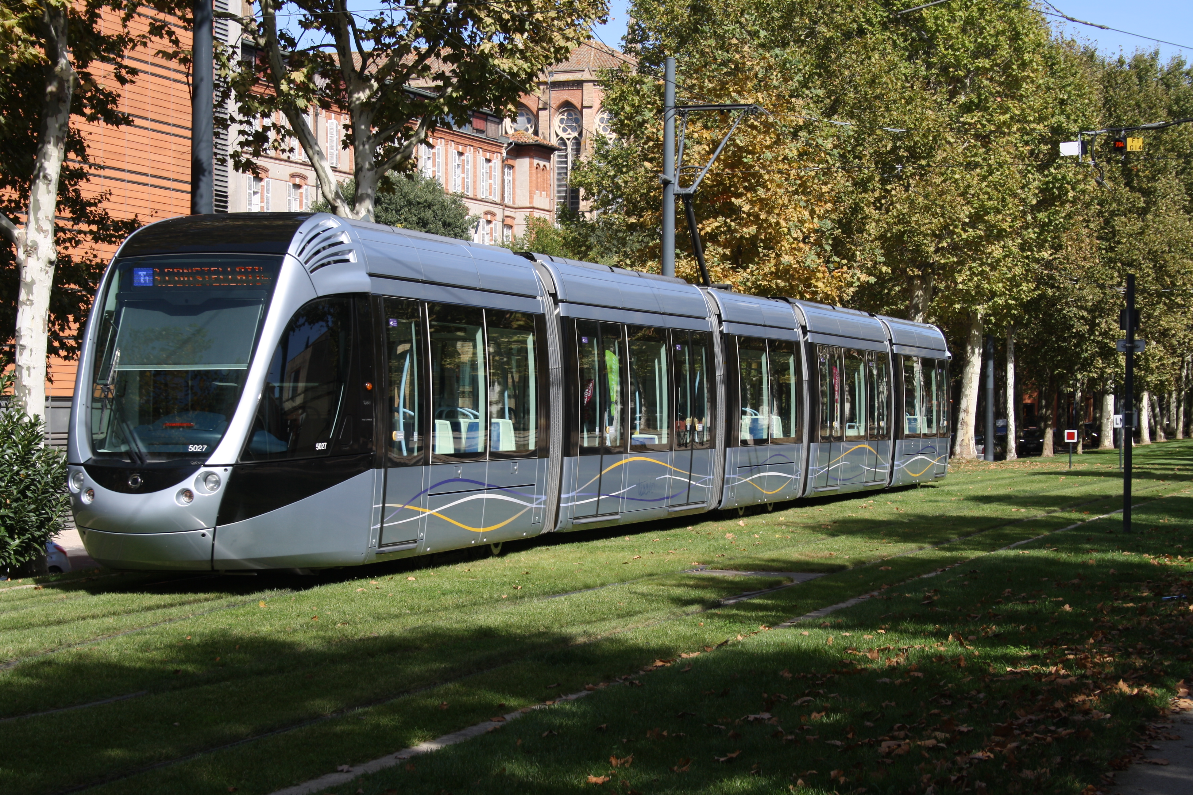 Citadis 302, Version Toulouse